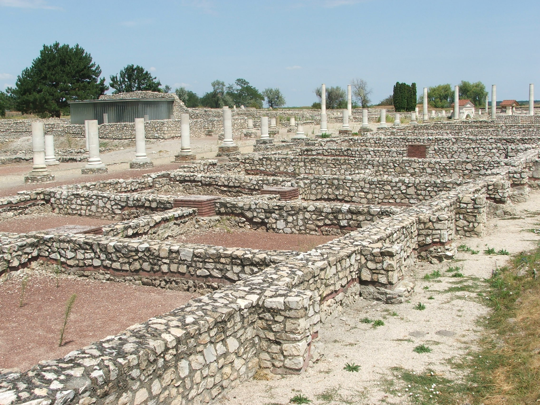 Tác, Gorsium, Decumanus Maximus, fôutca